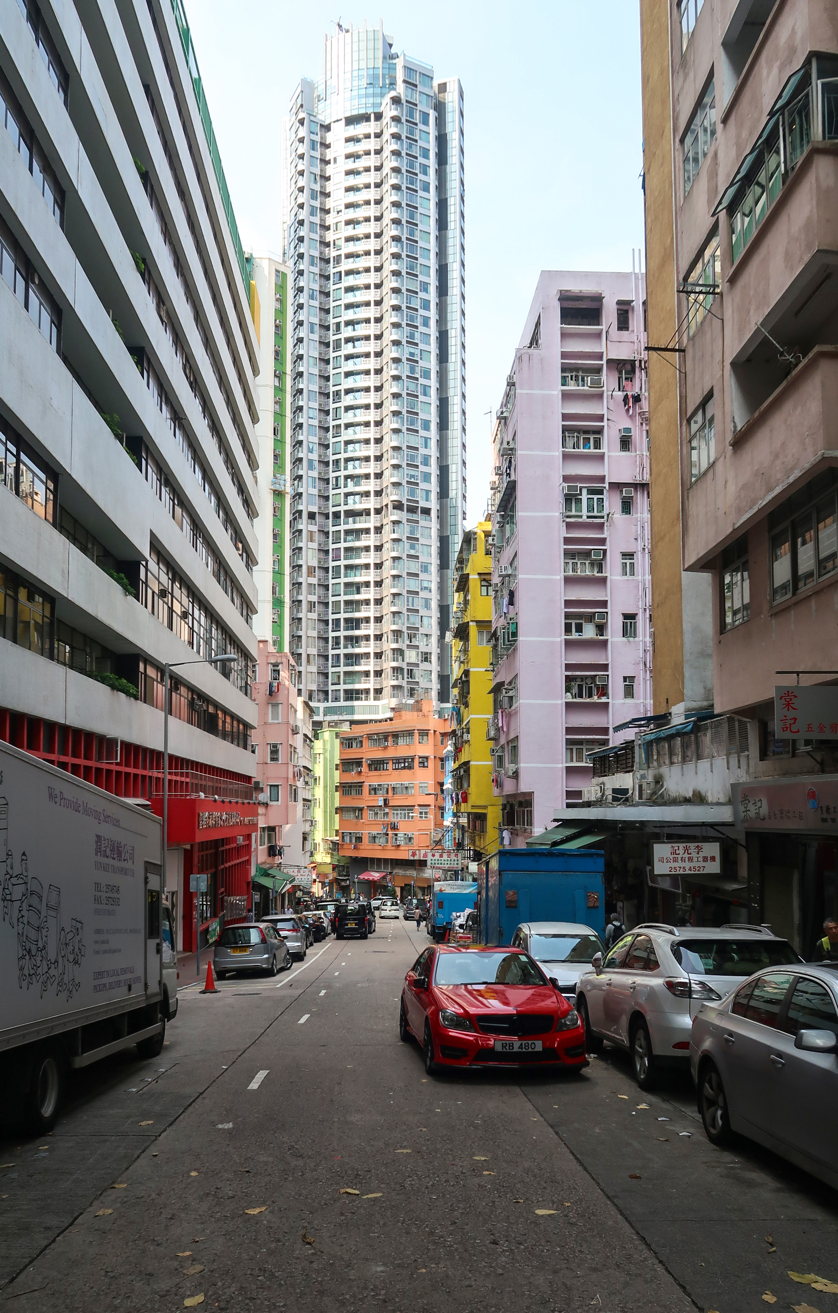 Stone Nullah Lane